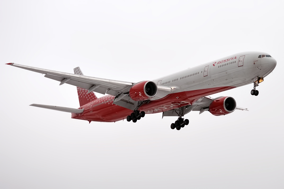 Rossiya, EI-UNP, Boeing 777-312